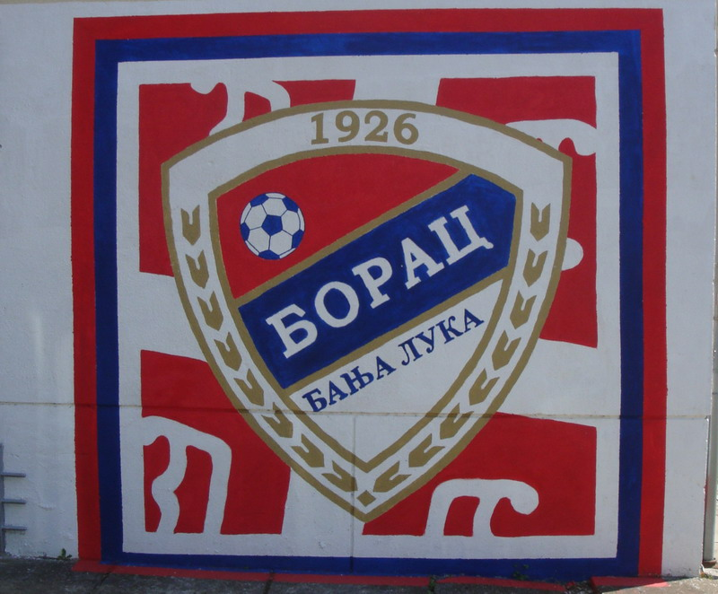 Графит_у_Борику